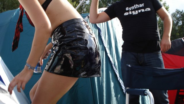 Attendants of Arvikafestivalen